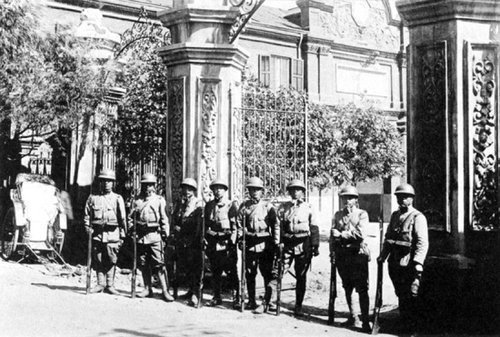 中文（中国大陆）: 奉天市政公所门口